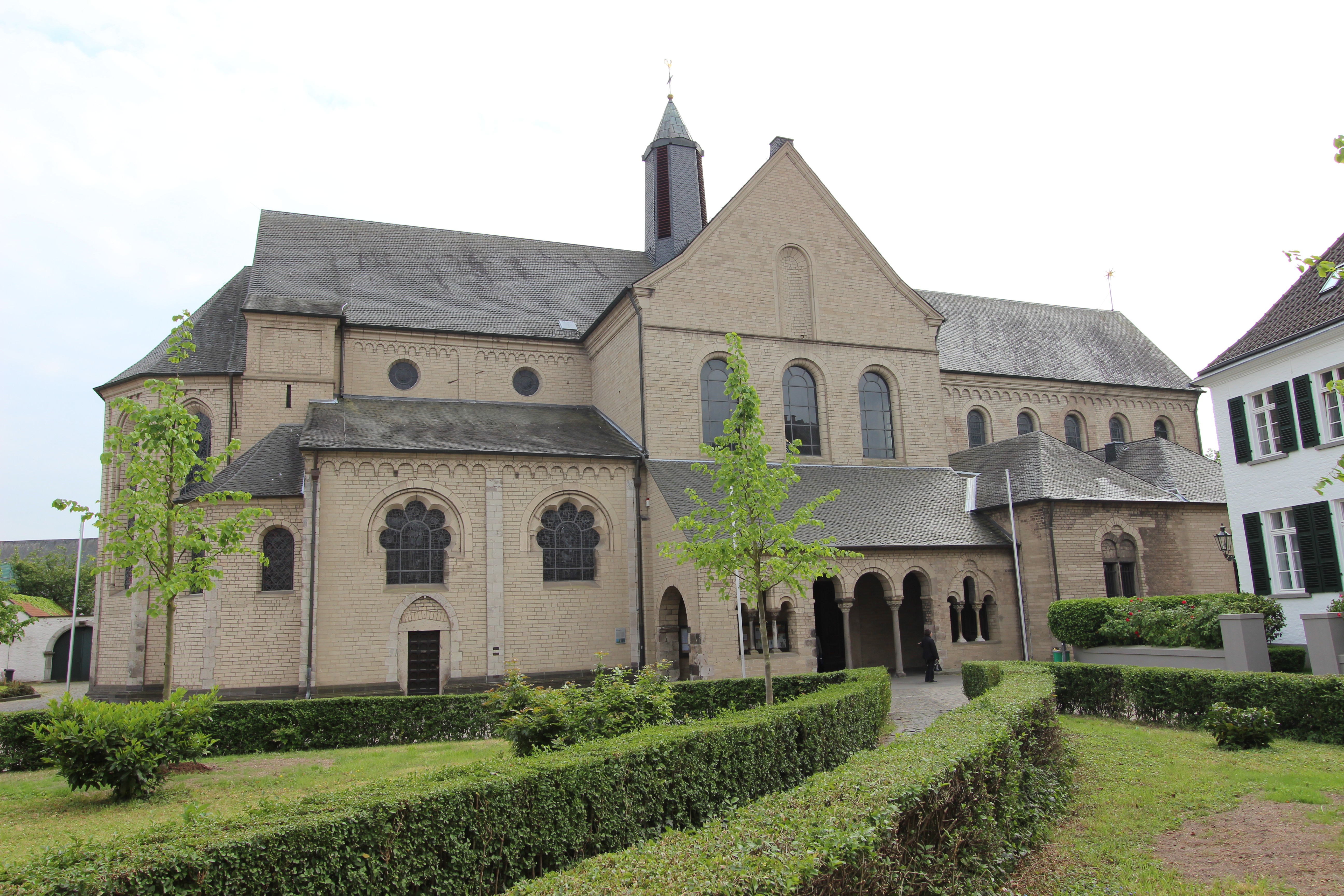 40489 Düsseldorf-Kaiserswerth; Basilika St. Suitbertus mit Stiftsplatz. Ansicht aus Süd-Osten. Aufnahme von 2016.